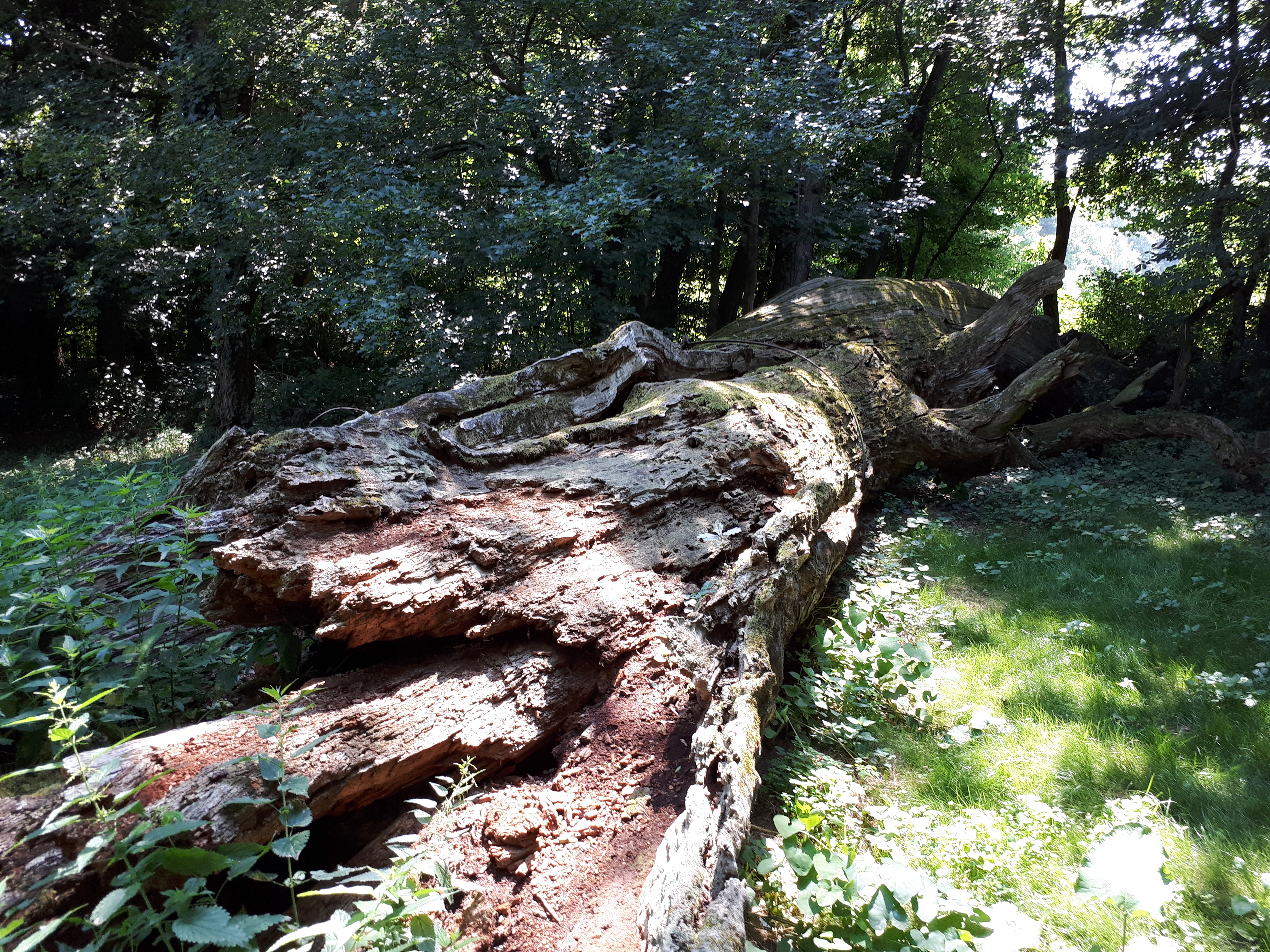 A zsennyei 1000 éves tölgy kidőlt déli törzsrész, készült 2018/07/10